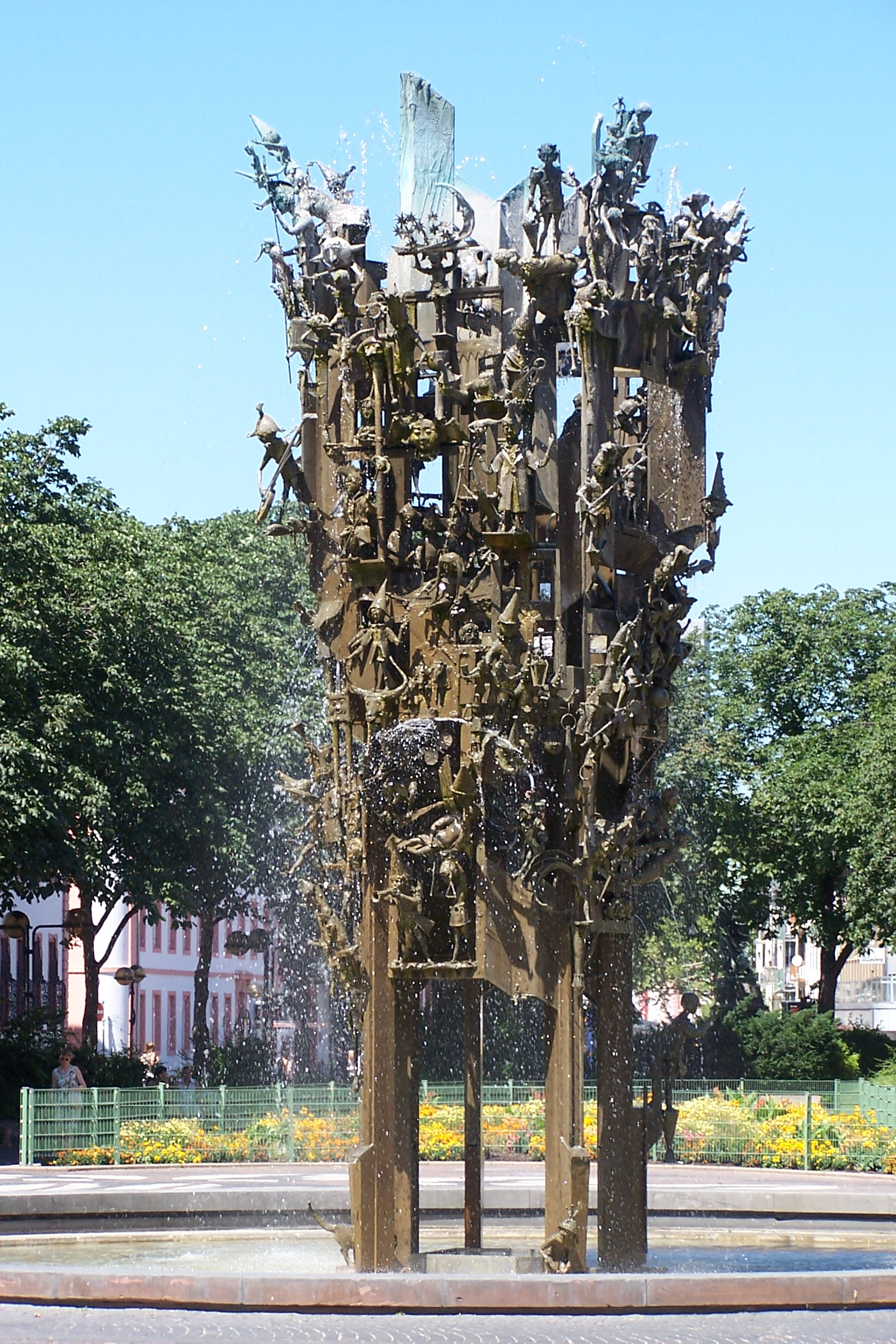 Mainzer Fastnachtsbrunnen im Sommer 2006